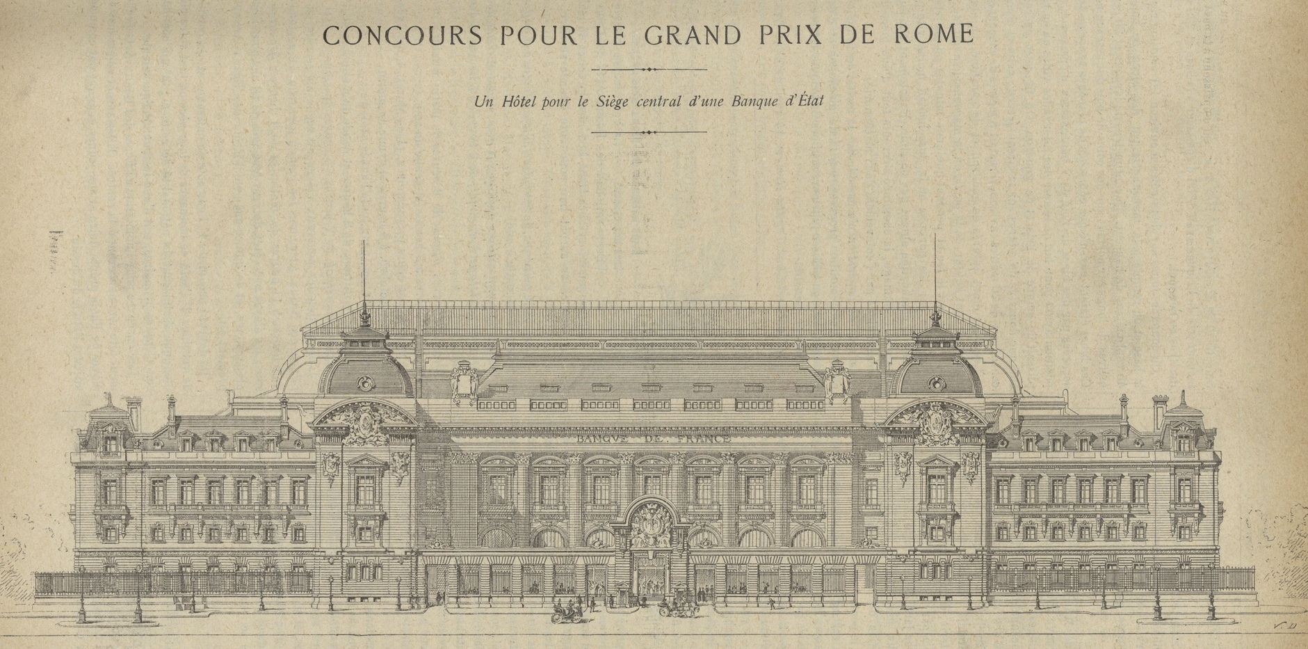 Élévation d'un hôtel pour le siège central d'une banque d'état, projet de Tony Garnier pour le grand prix de Rome de 1899, paru dans la Construction lyonnaise du 01/10/1899